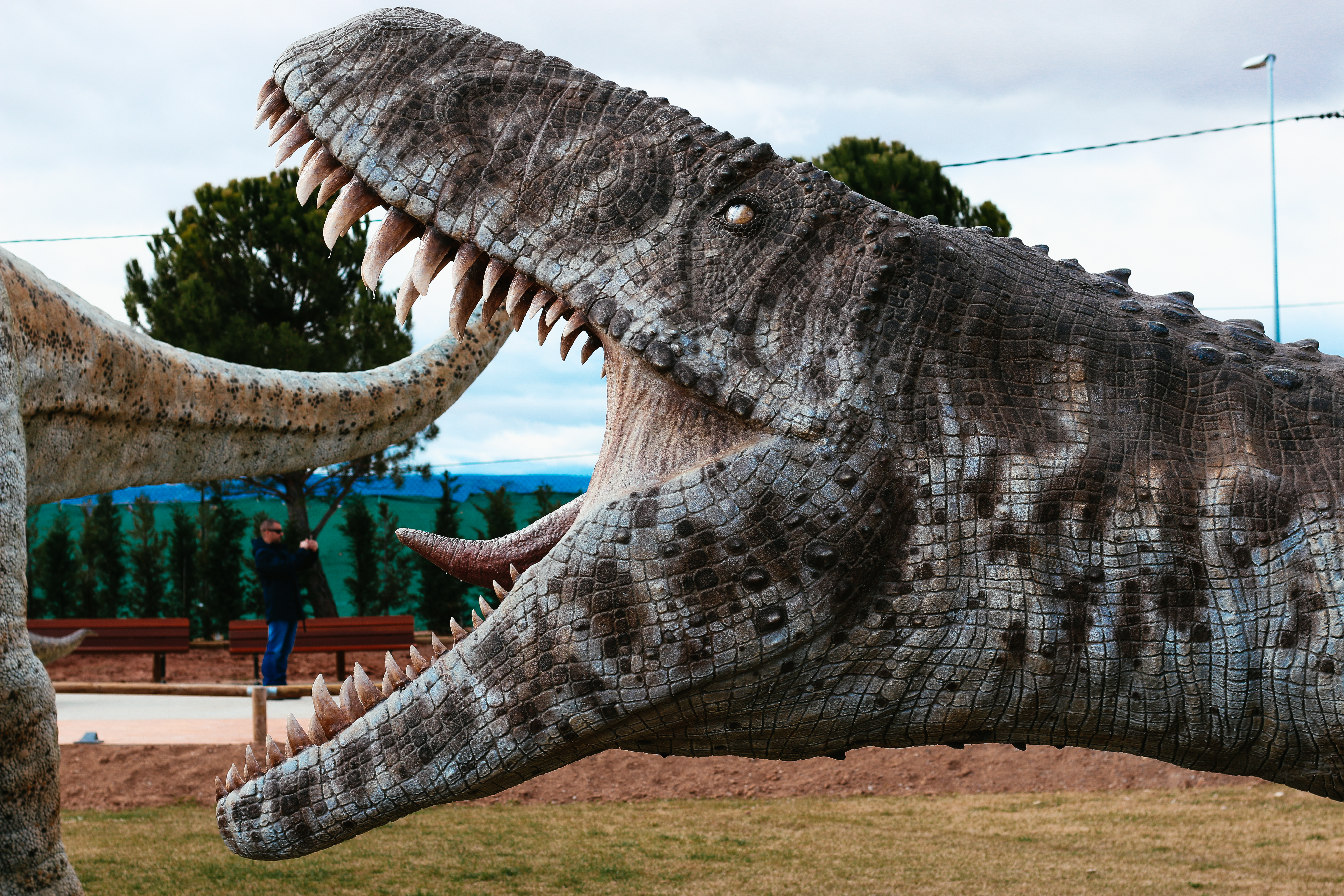 Escultura de un Torvosaurus en el parque temático Dinópolis